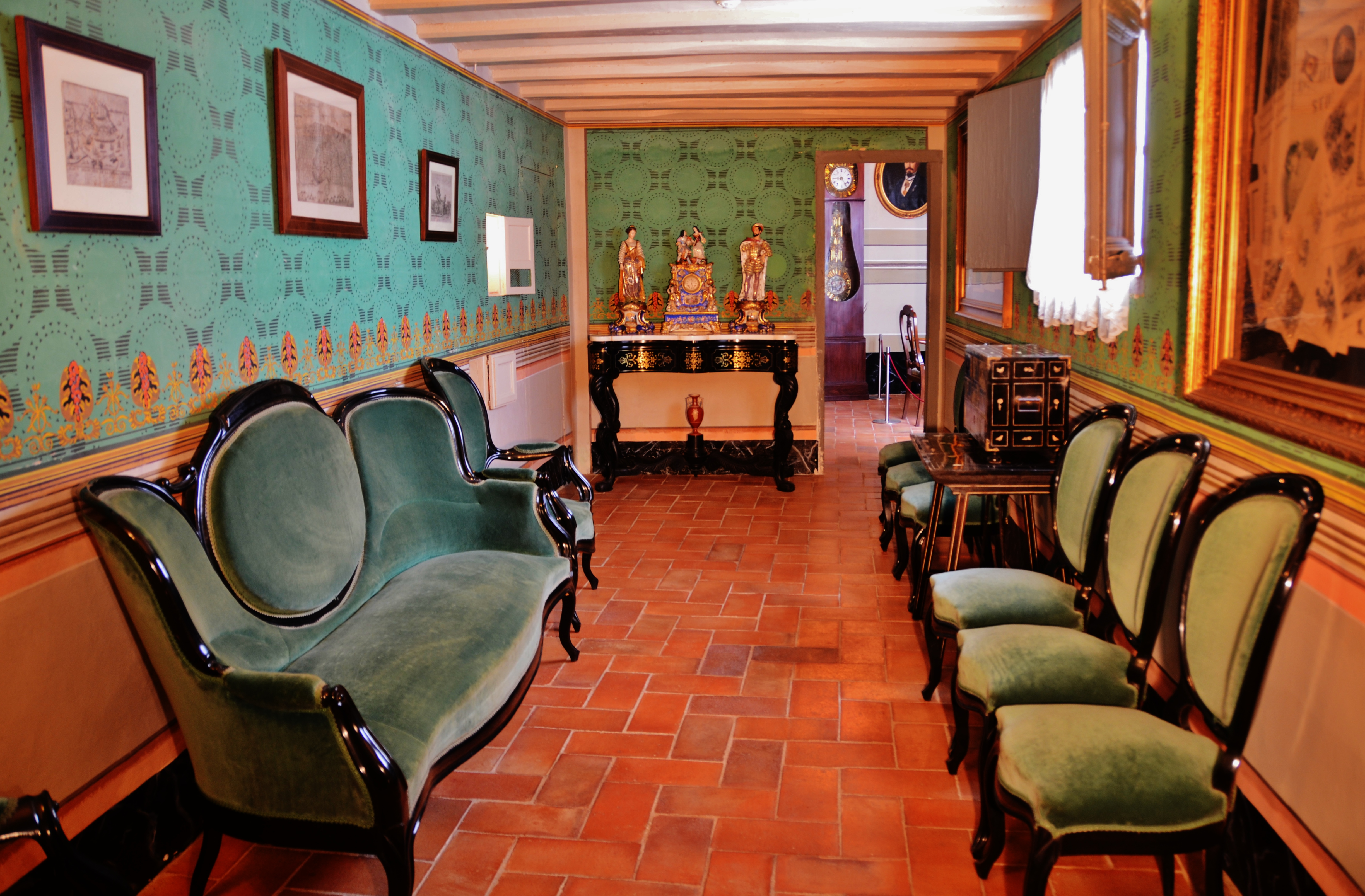 Interior de la Sala d'Espera del Museu Romàntic Can Papiol, Vilanova i la Geltrú (Catalonia).